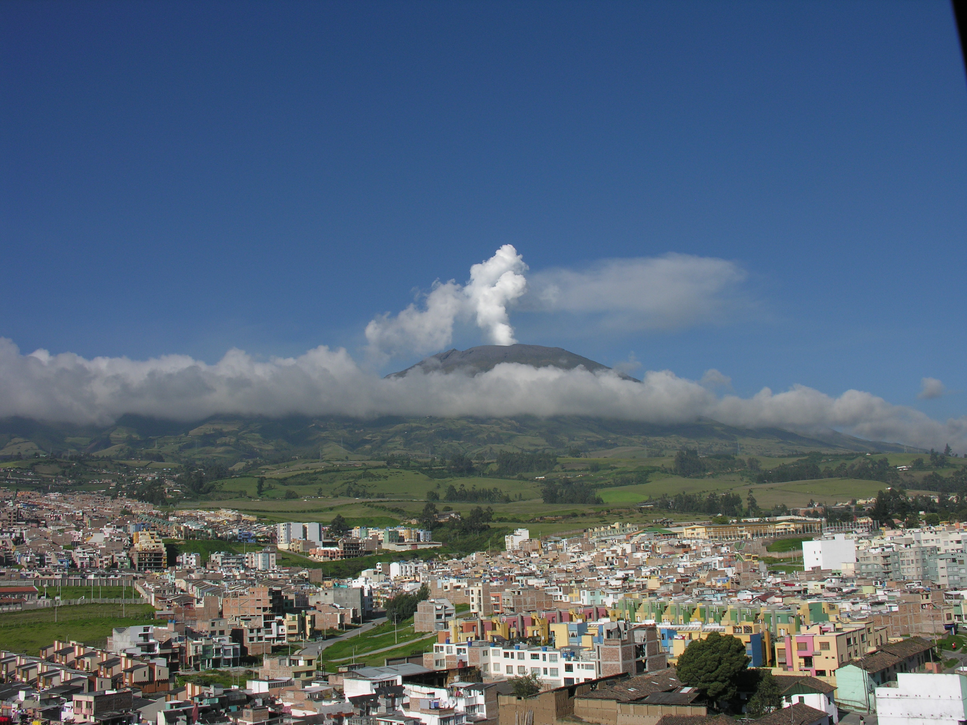 Volcán Galeras - Pasto - Colombia. Foto: José Camilo Martínez S. Imagen tomada durante una fumarola de vapor.